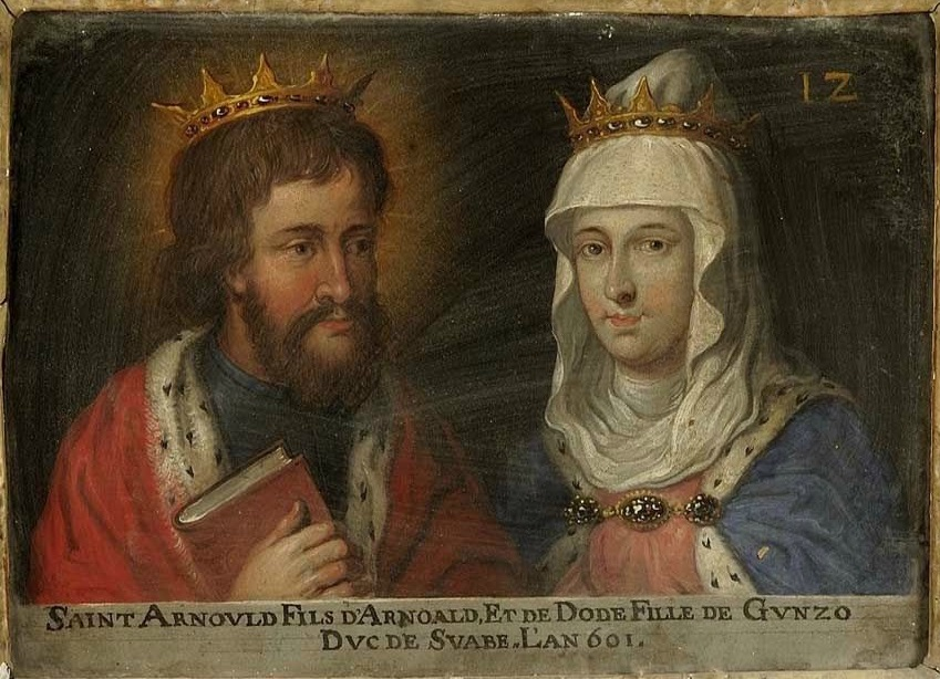 Portrait de Saint Arnould, duc de Mosellane, et de son épouse Dode de Boulogne. Ce tableau fait partie d'une suite d'une soixantaine de double-portraits représentant les ducs et duchesses de Lorraine ainsi que leurs ancêtres supposés.